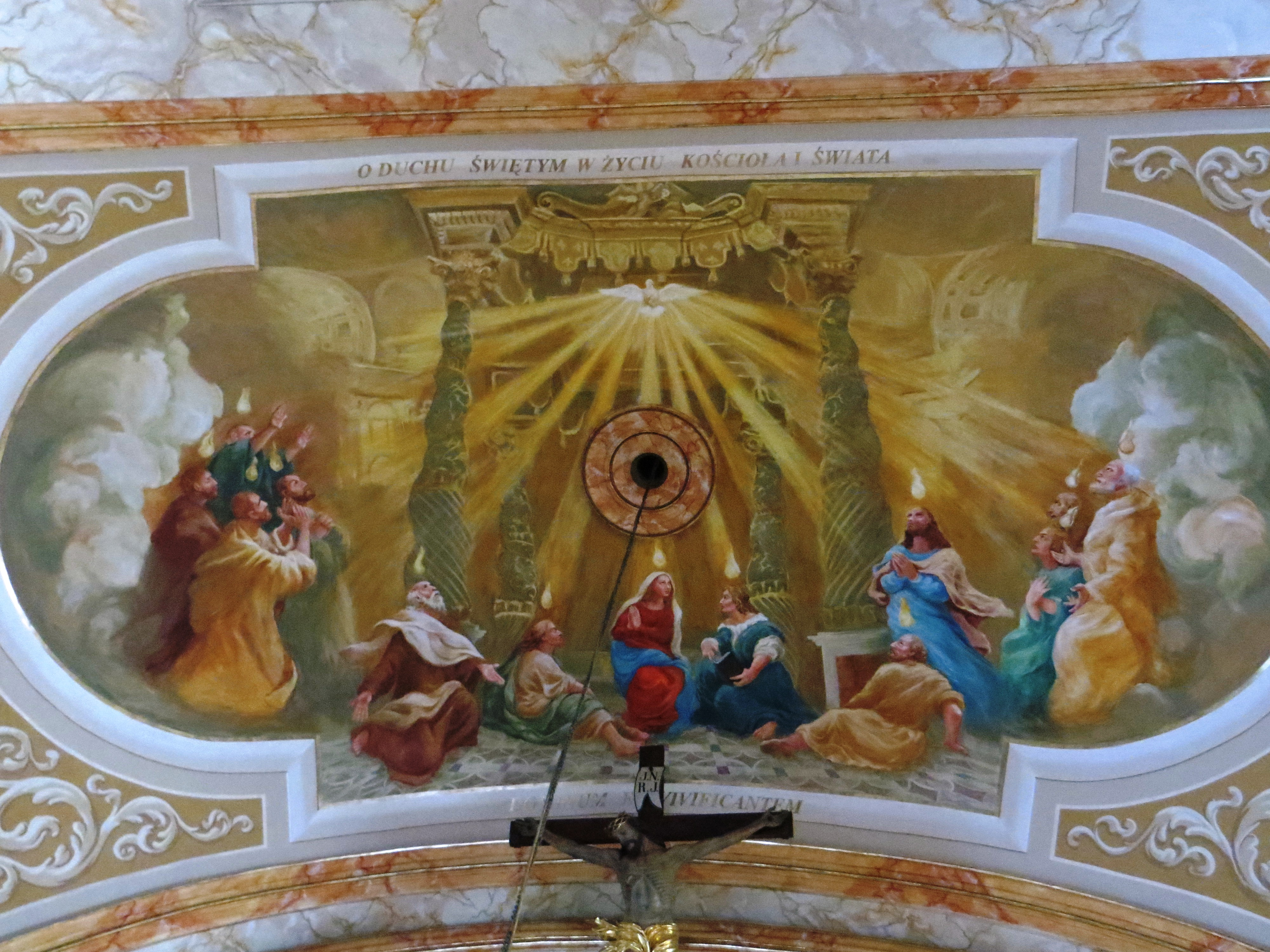 Malowidła na suficie w bazylice ONMP w Wadowicach.